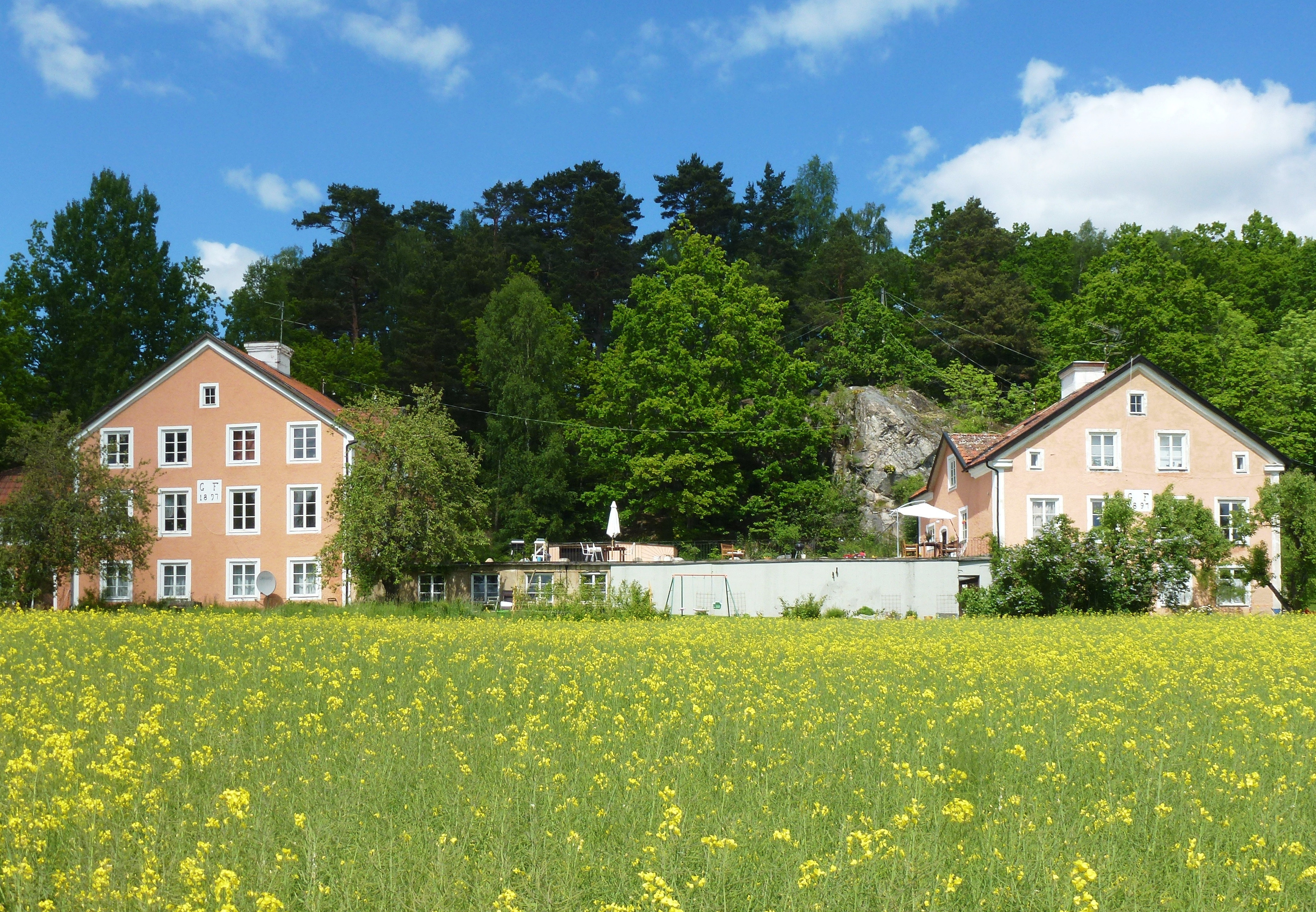 Sjöbergs varv, bostadshusen